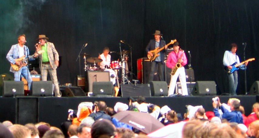 Normaal, parkpop 2006